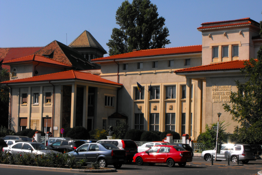 Institutul Nicolae Iorga